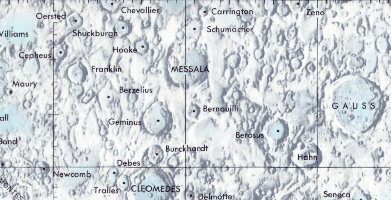 Cráter lunar Bernoulli. Localización. (Lunar Chart LPC1. Second Edition)